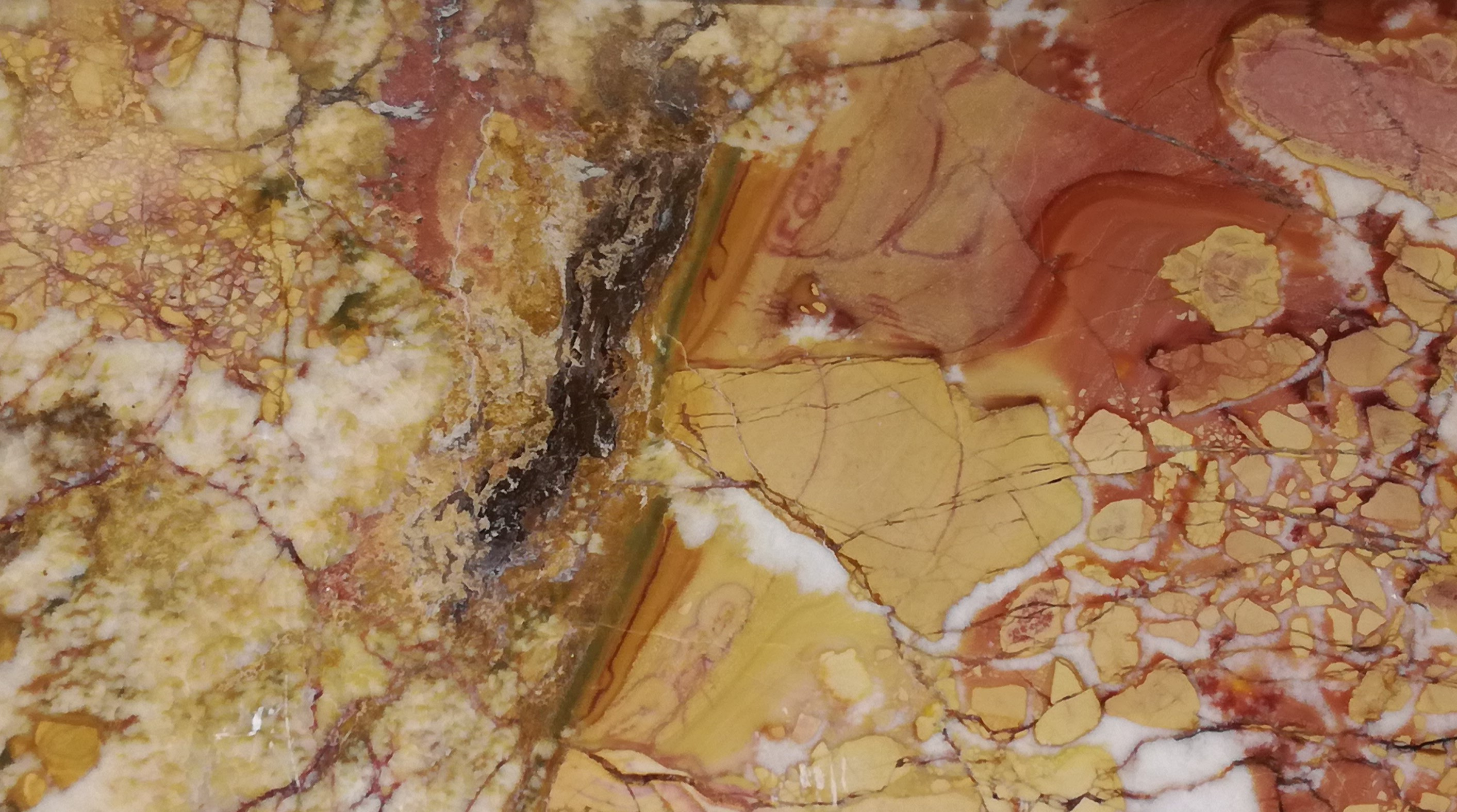 Marmor Valcaregna di Castione, Monte Giovo Trentino